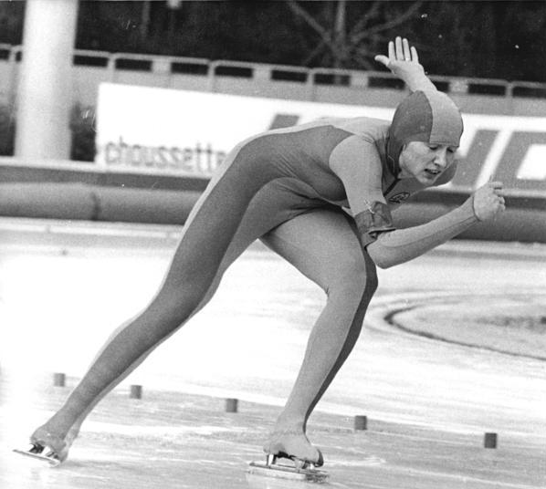 Karin Enke ADN-ZB Mittelstädt 20.11.82 Karl-Marx-Stadt: Vorschaumotiv zum Länderkampf im Eisschnellauf DDR-UdSSR Die 21-jährige Olympiasiegerin und zweifache Weltmeisterin im Sprint, Karin Enke (SC Einheit Dresden-Foto von einem früheren Wettkampf), wird beim internationalen Saison-Auftakt auf dem Karl-Marx-Städter Kunsteisoval am Küchwald am 27. und 28.11.1982 an den Start gehen. Abgebildete Personen: Enke, Karin: Eisschnelläuferin, DDR